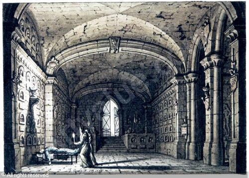 Zwei Mönche bei Kerzenschein vor einem Leichnam in einer Klostergruft